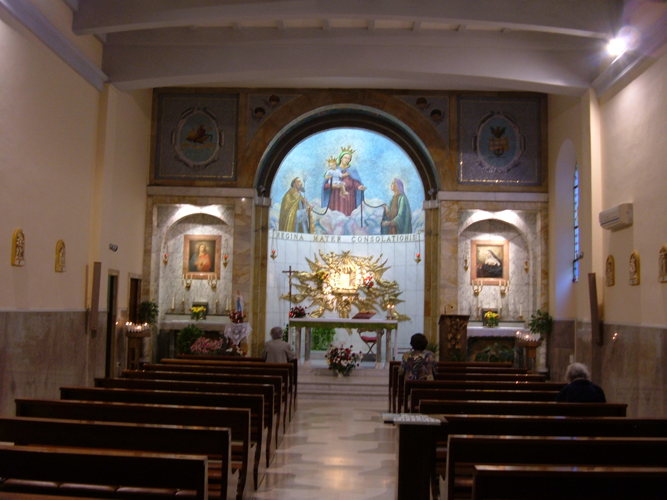 Chiesa di Santa Maria della Consolazione, a Roma, nel quartiere Gianicolense. Interno.